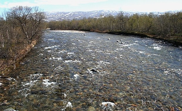 Stabburselva in Porsanger, Finnmark, Norway.